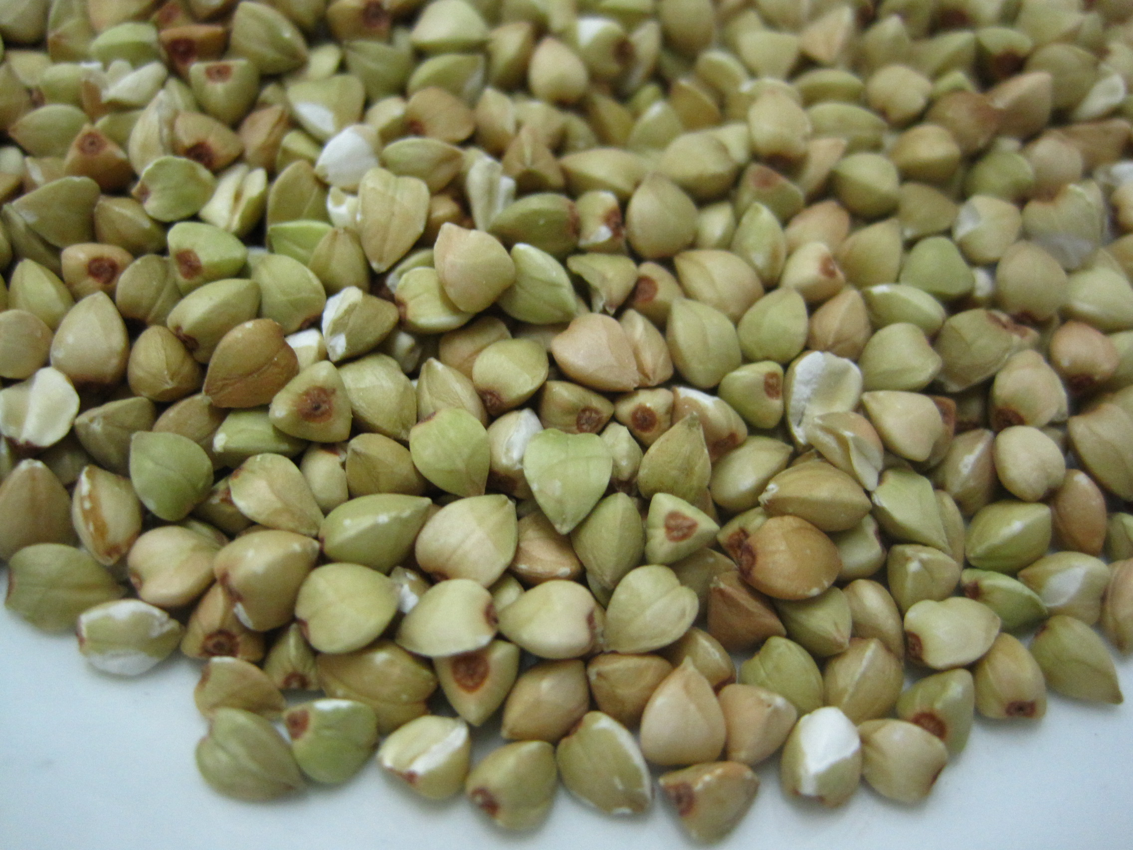 Heljda